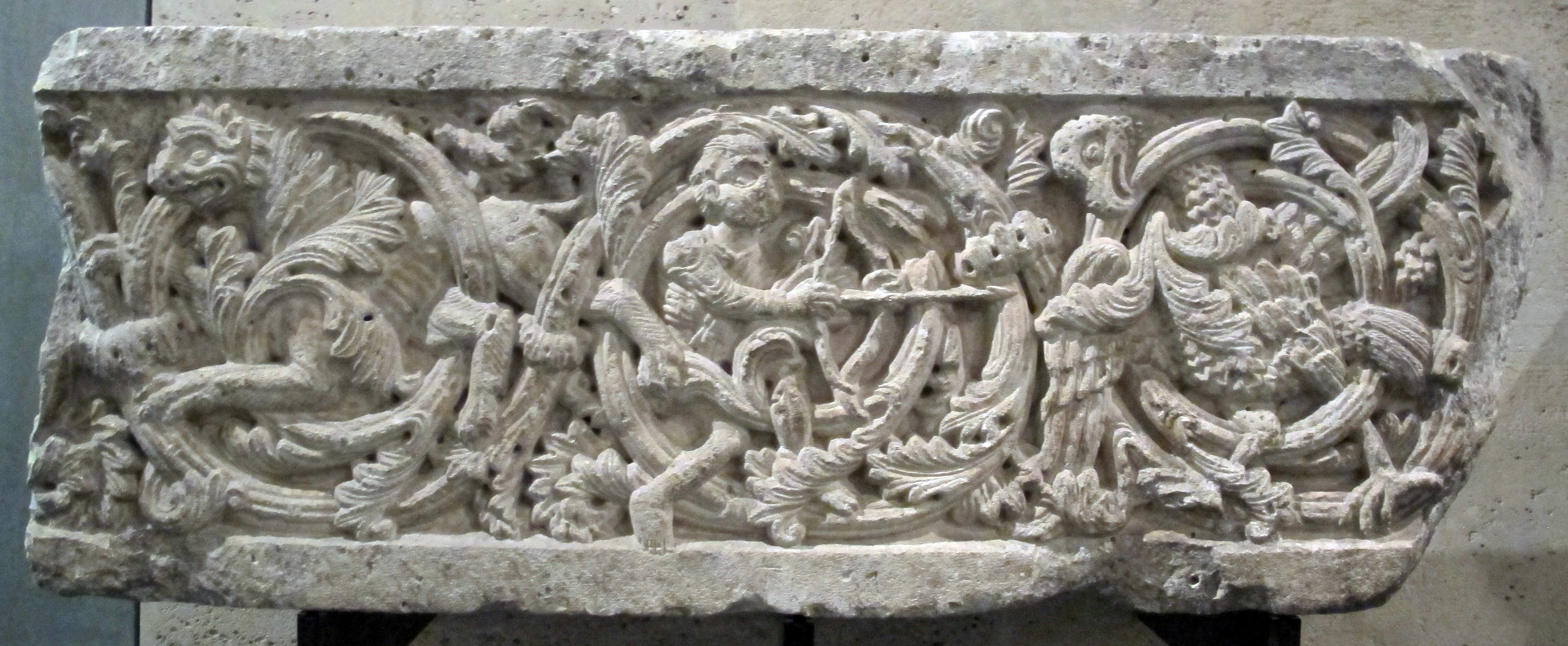 Scultura italiana, Louvre